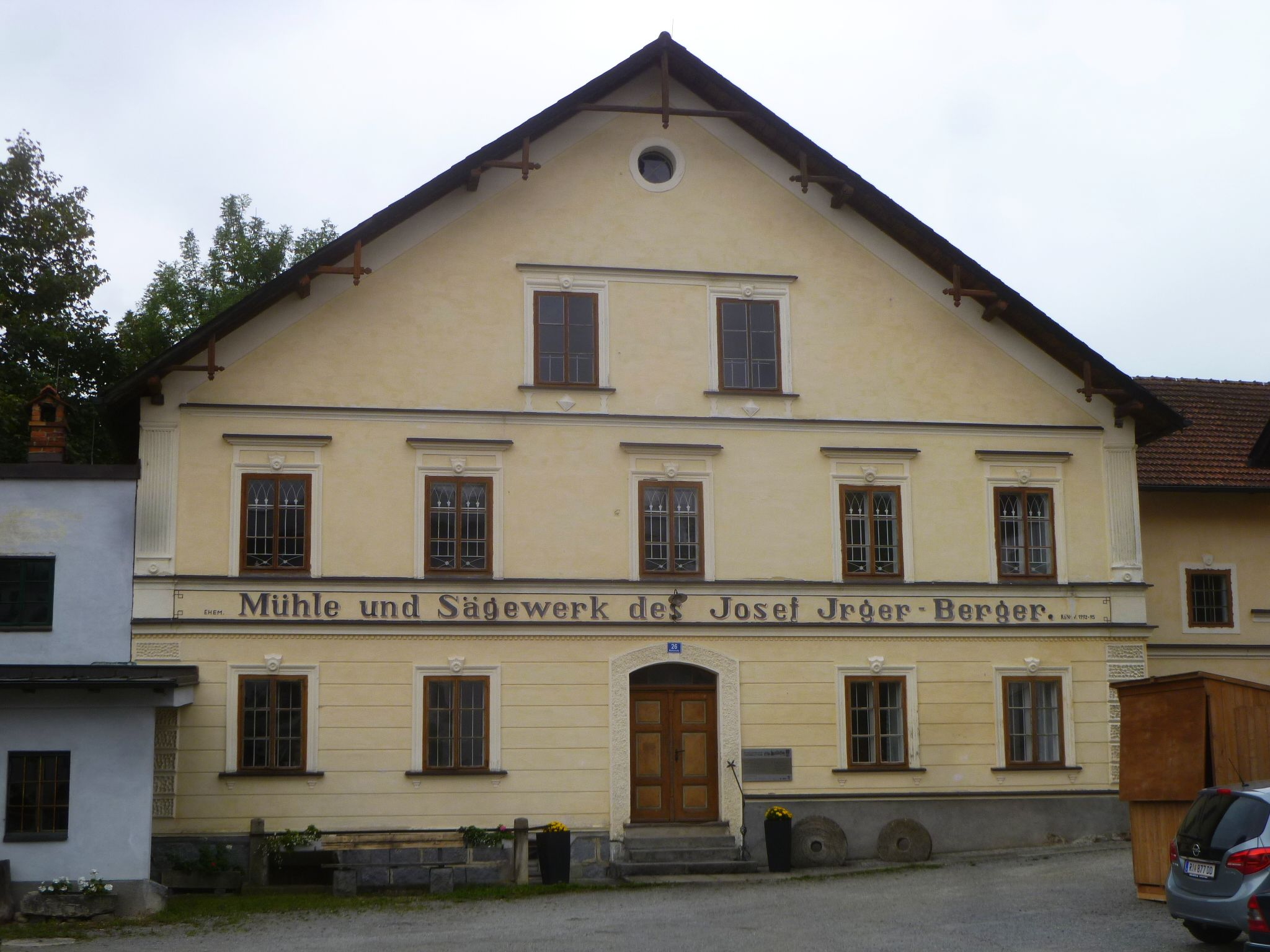 Ehem. Furthmühle